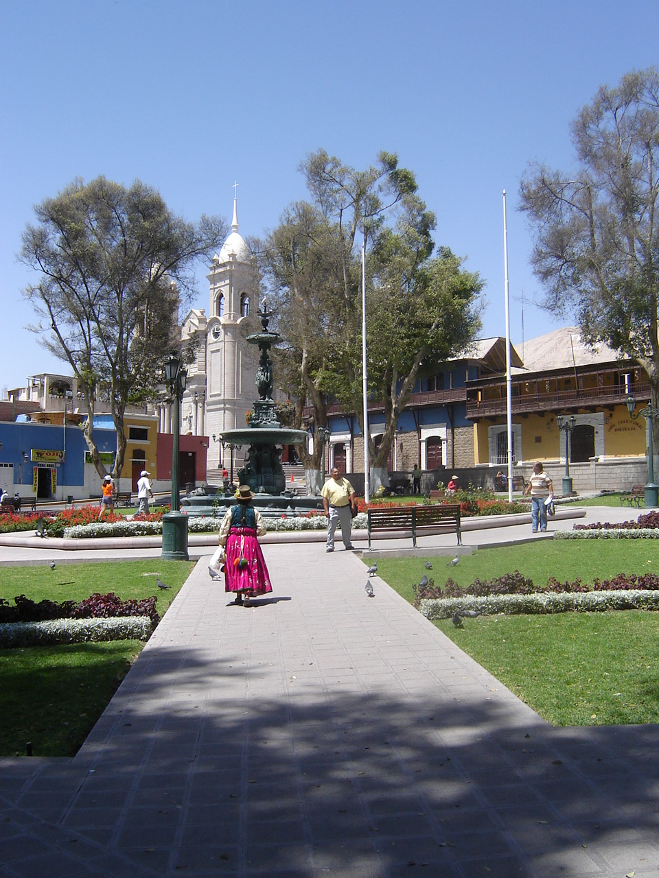 Fotografía de la Plaza de Armas de Moquegua